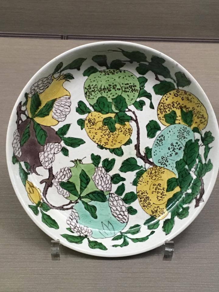 清 康熙 素三彩花果紋盤作品照片